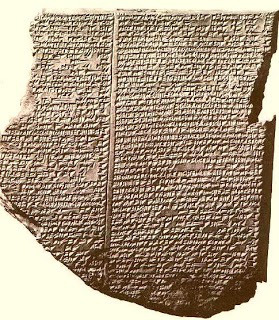 Planxes de fang amb caràcters fets amb punxó